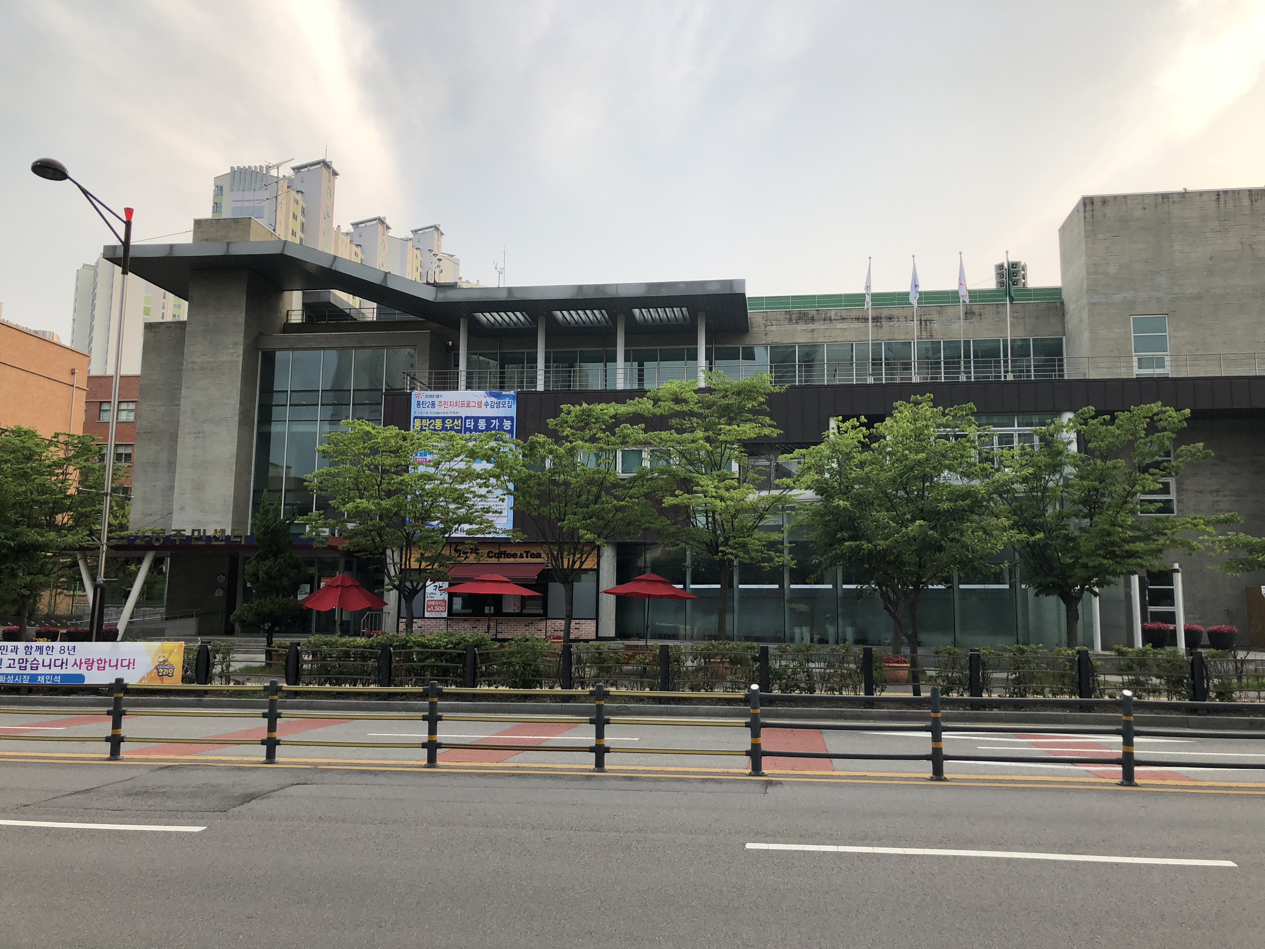 동탄2동주민센터